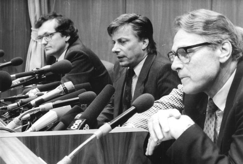 ADN-ZB-Grimm-20.3.1990-Le-Berlin: Pressekonferenz- Die Vorsitzenden der liberalen Parteien, v.l.n.r. Dr. Jürgen Schmieder (DFP), Prof. Dr. Rainer Ortleb (LDP) und Dr. Bruno Menzel (F.D.P), haben im Kinosaal des Internationalen Pressezentrums deren Vereinigung vorgeschlagen. Die Entscheidung der Führungsgremien der Parteien bedarf der Zustimmung einer gemeinsamen Delegiertenkonferenz, die am 27. Mai in Berlin stattfinden wird.